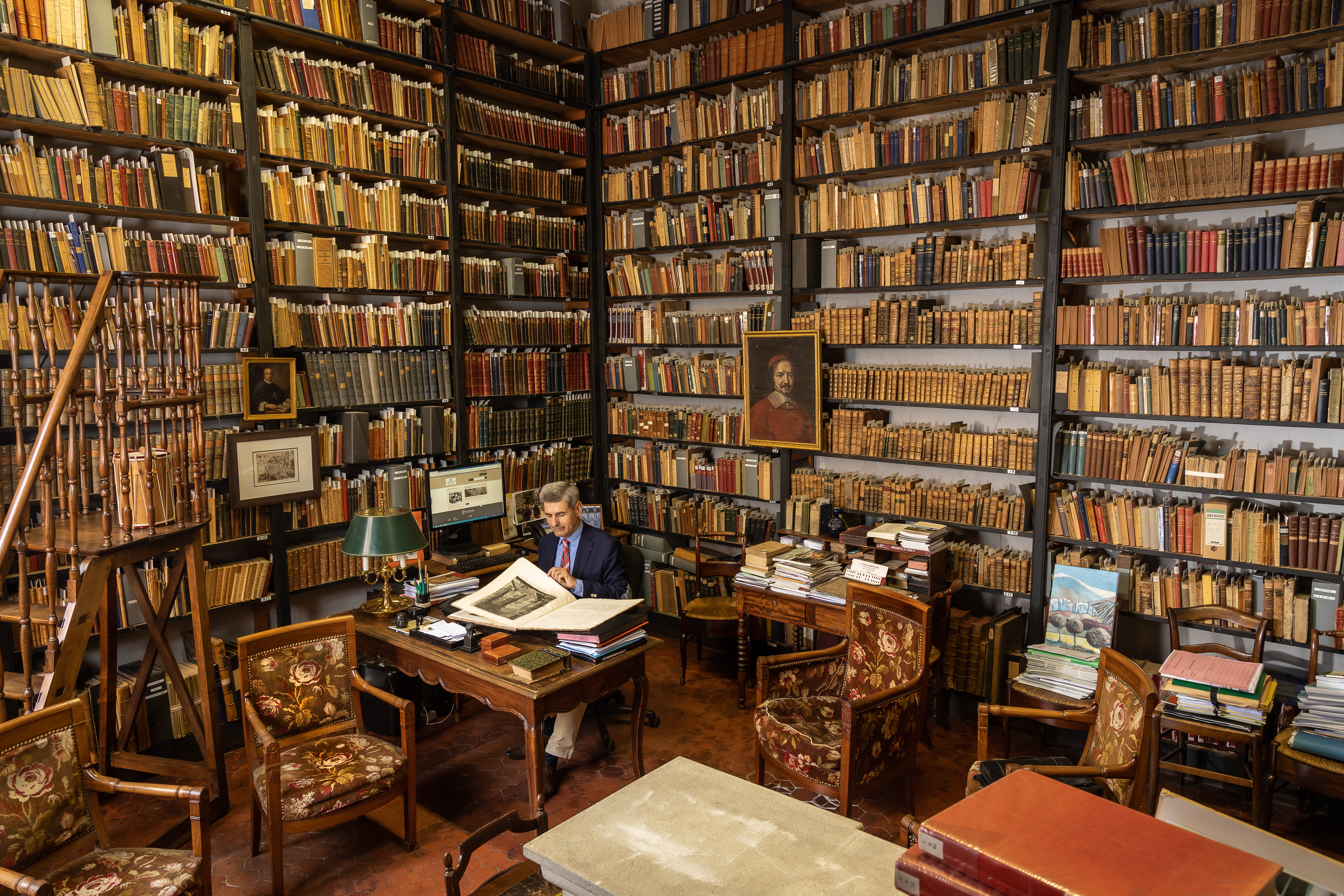 Jean-François Delmas, conservateur général, assis à son bureau, à l'Inguimbertine, boulevard Albin, Carpentras.